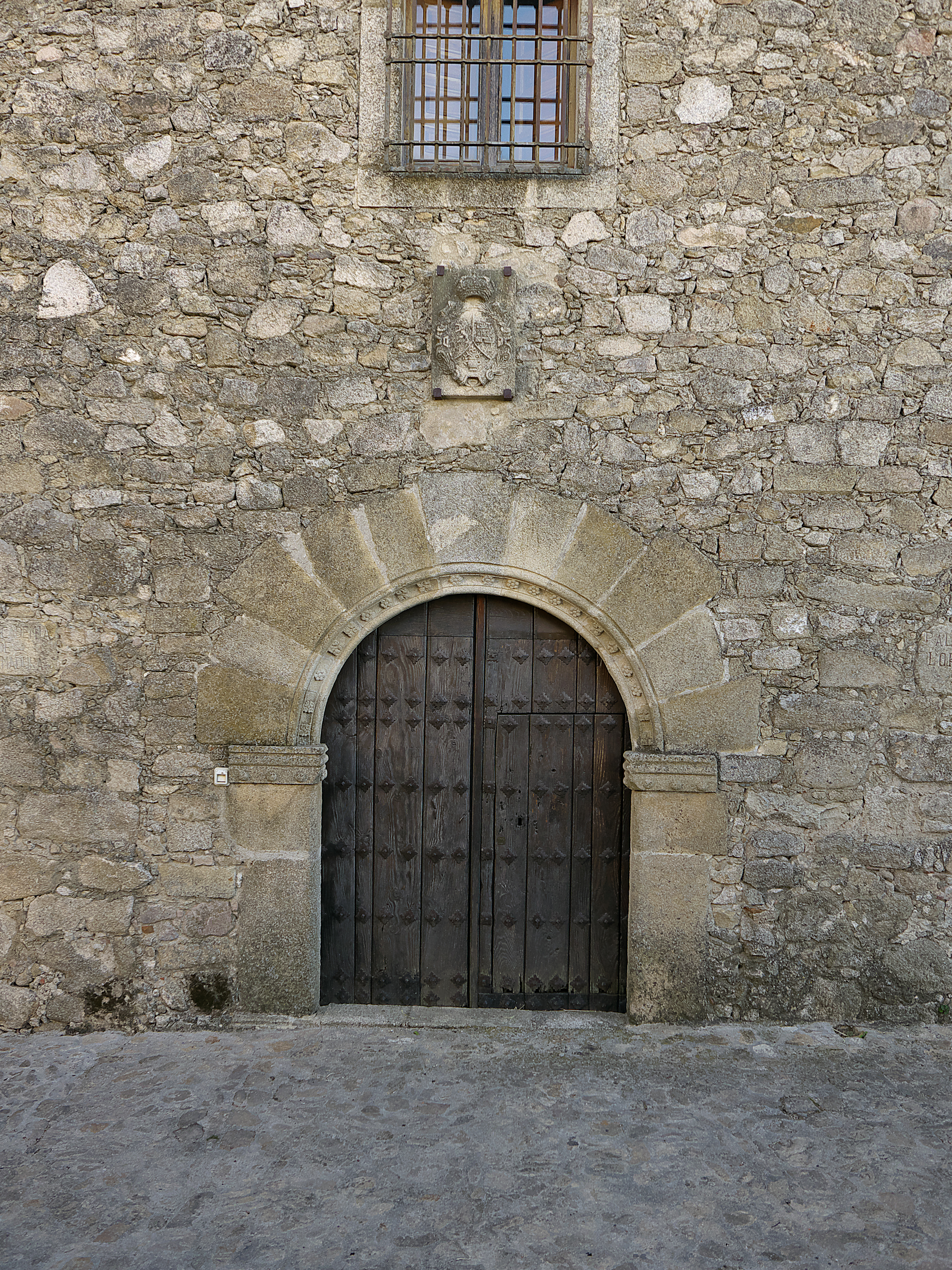 Diego Pizarro de Hinojosa, señor de Torrecillas de la Tiesa y María de Carvajal, su mujer, construyen este palacio (s. XVI), que lo herederá Álvaro Pérez Quiñones y Lorenzana (1642).